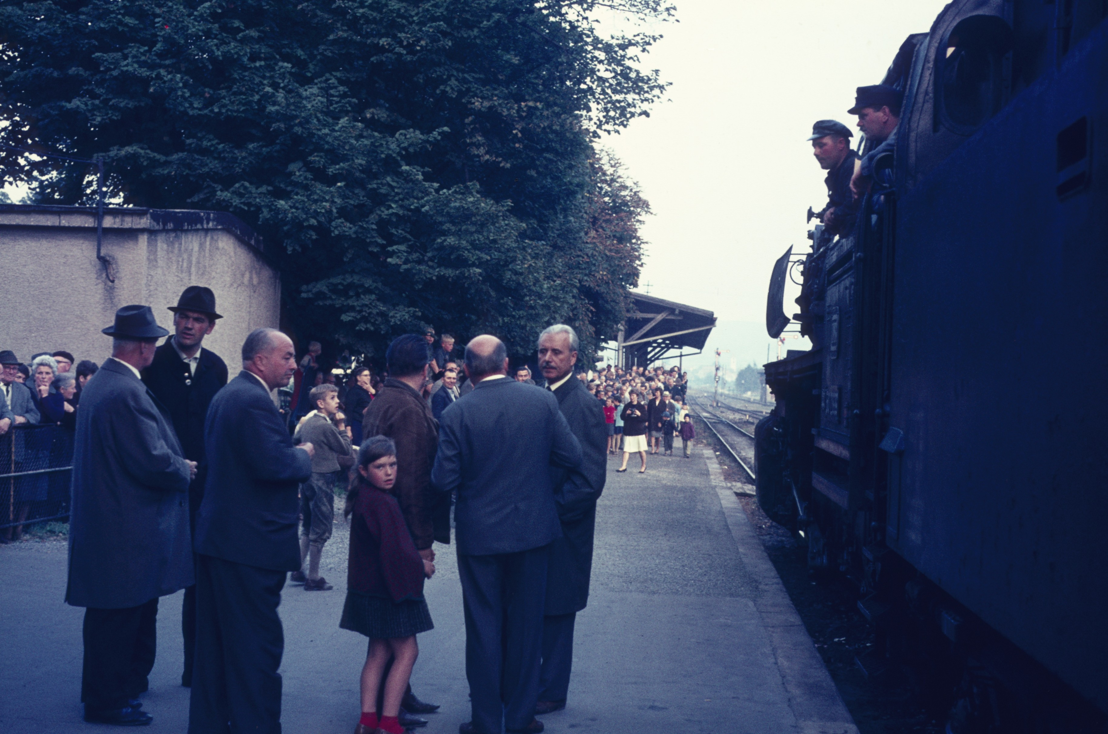 Letzte Fahrt der Heubergbahn Bahnhof Spaichingen 5